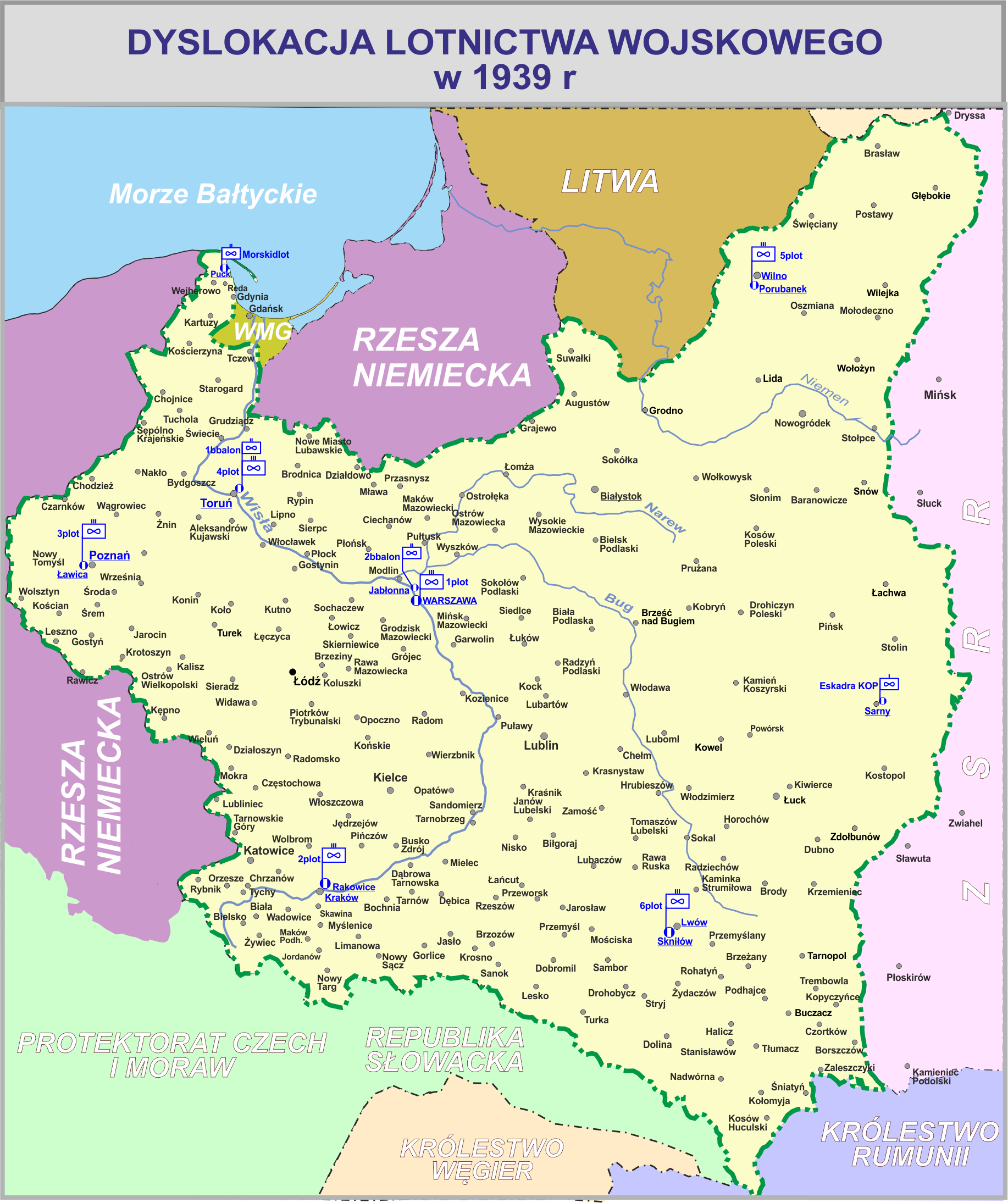 Dyslokacja lotnictwa wojskowego w 1939